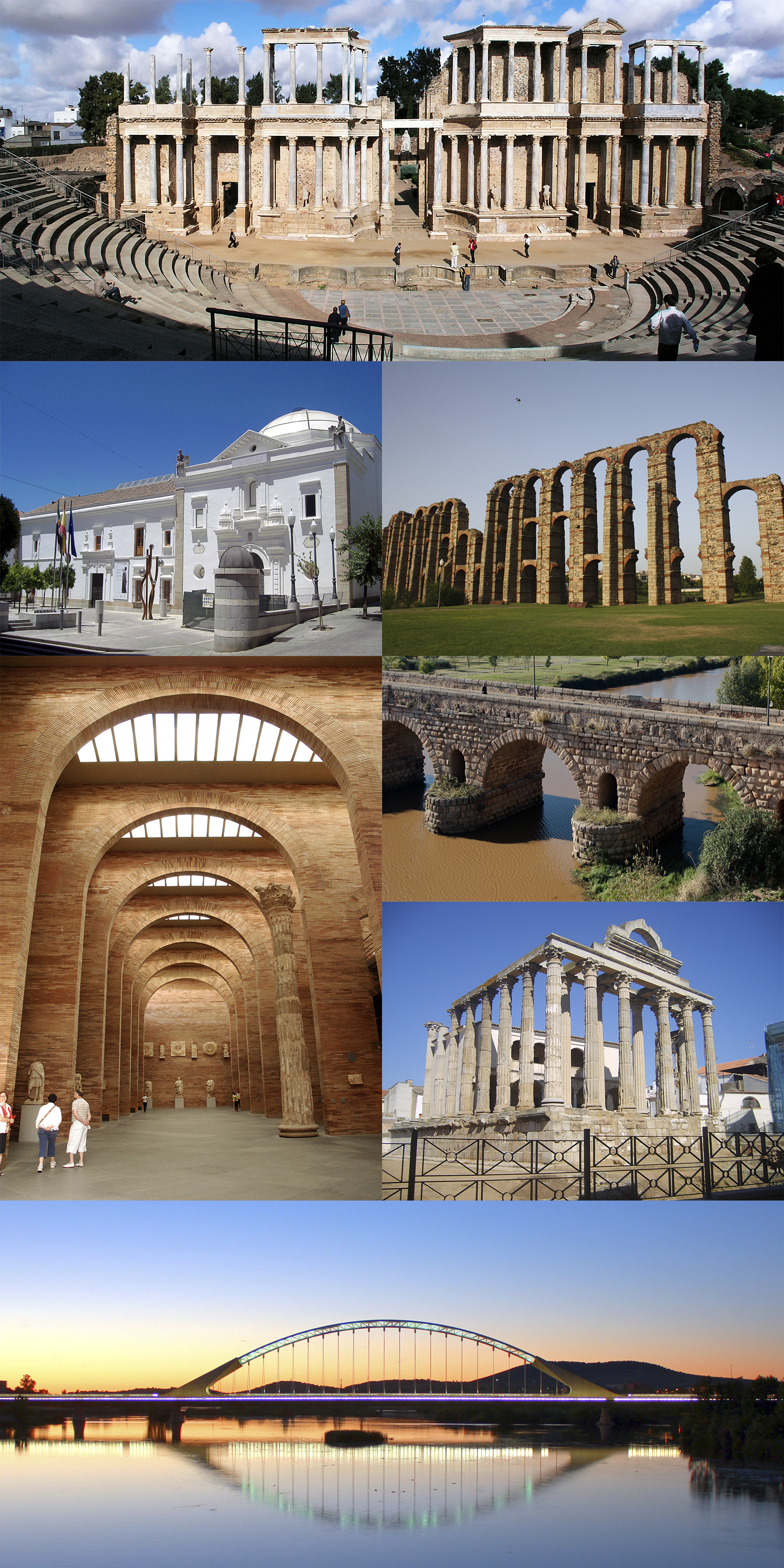 Collage de Mérida